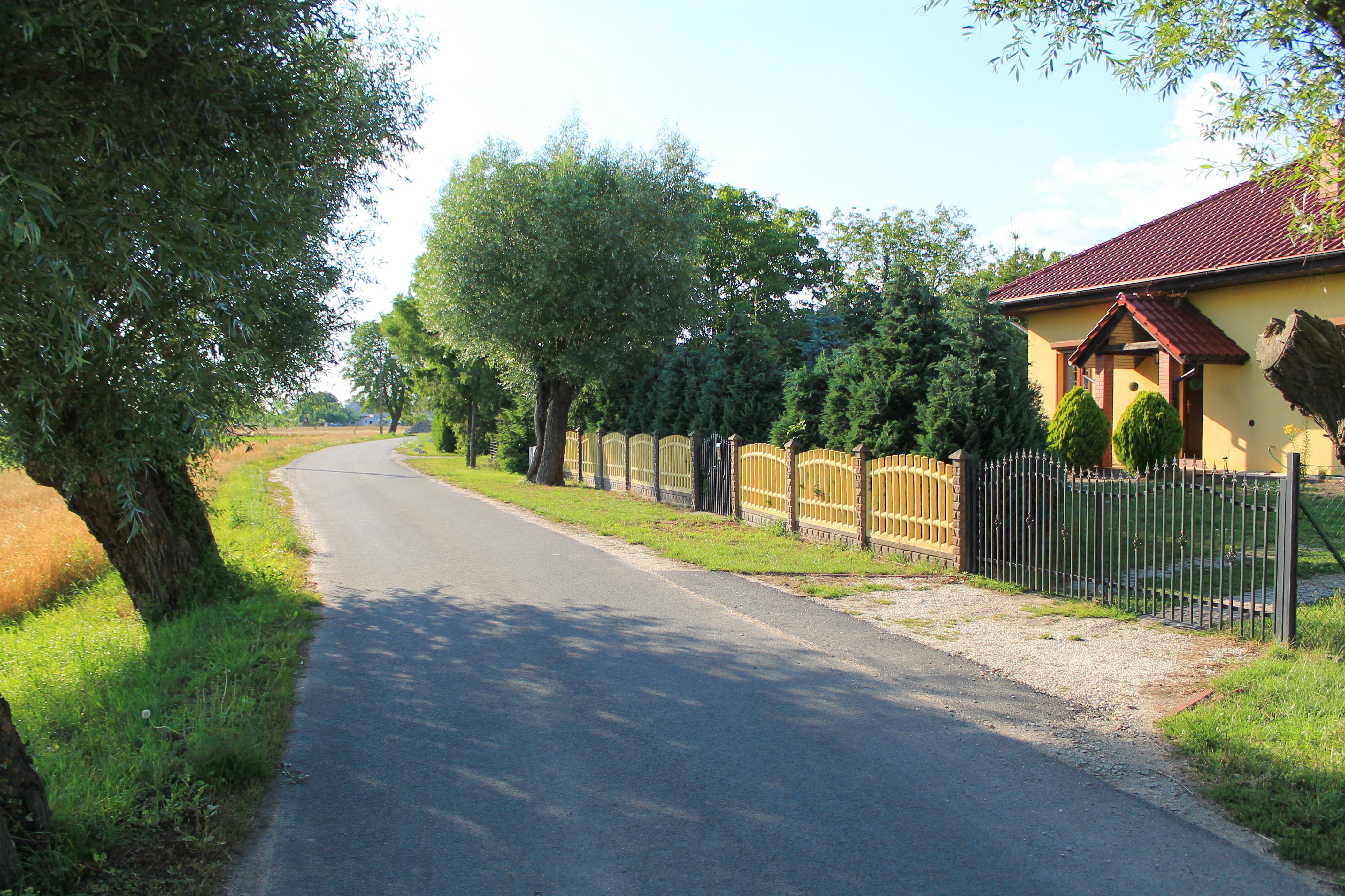 Moraczewo, zabudowania wzdłuż drogi